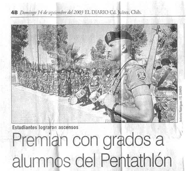 El Condedetrevino en persona